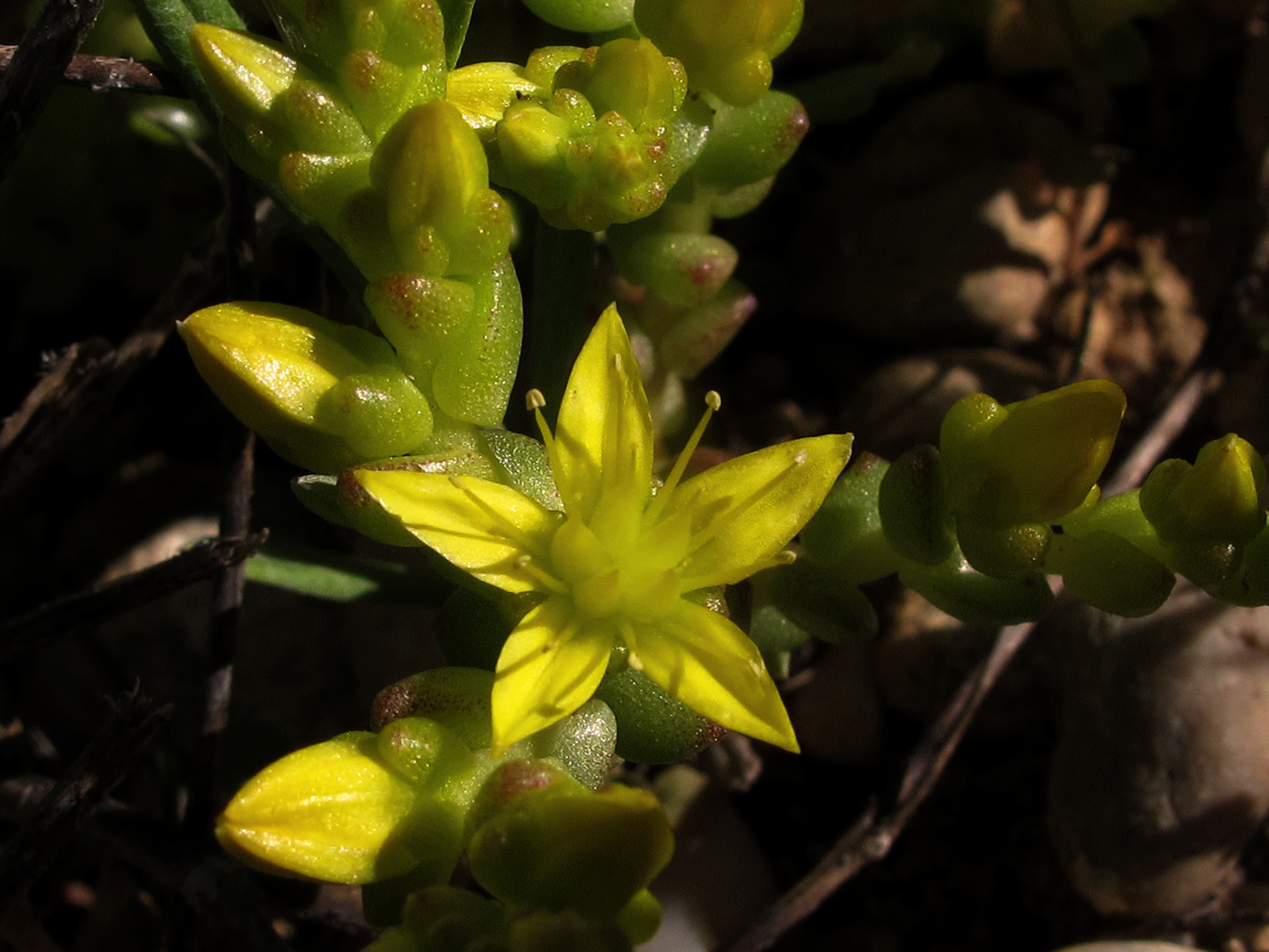 Les gusta más los terrenos pobres o pedregosos. Tiene preferencia por los suelos calcícolas.